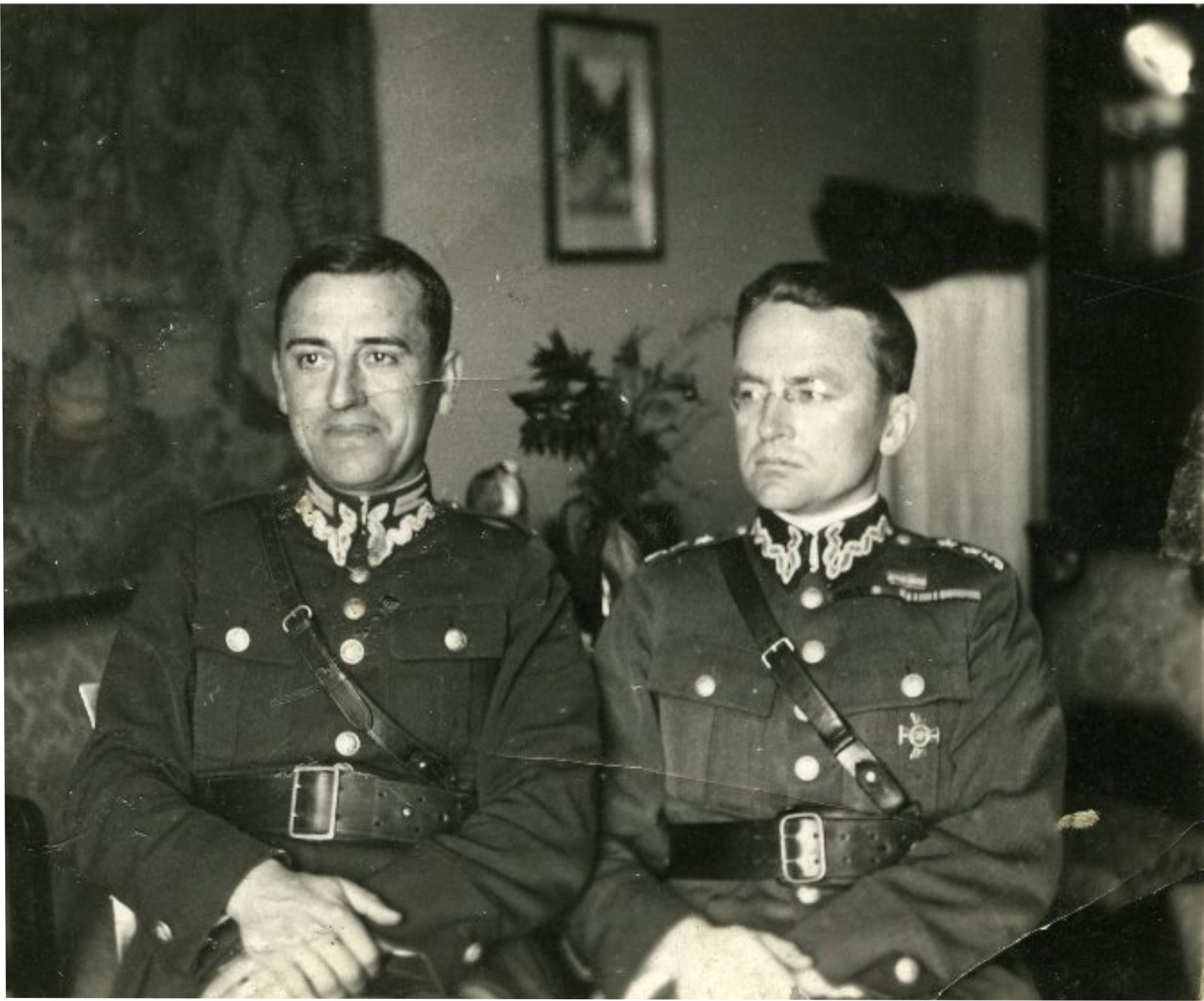 Bracia Adam i Romuald Lucas